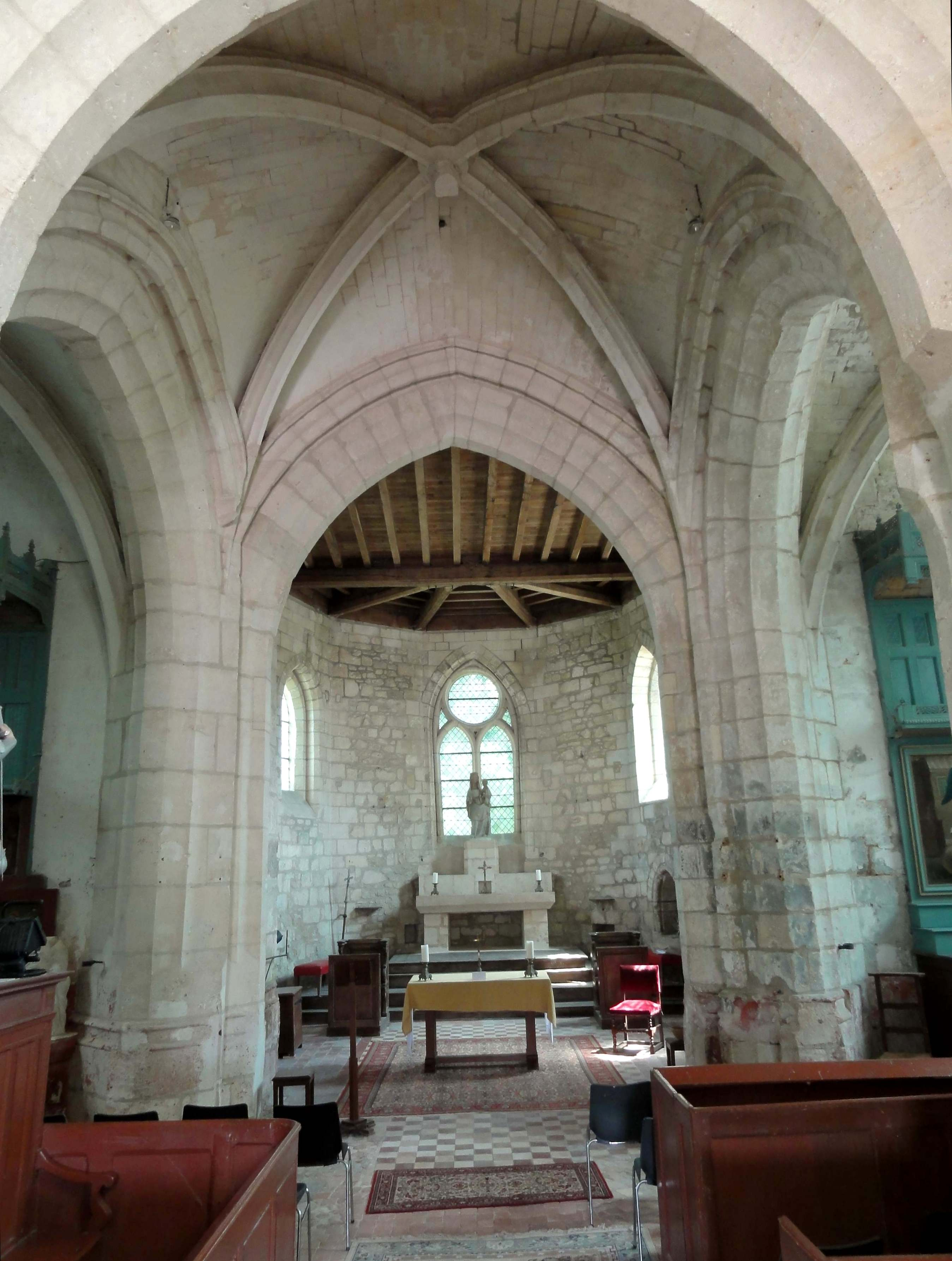 Intérieur de l'église (voir titre).